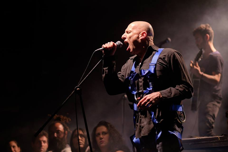 גיל אלון בהופעה